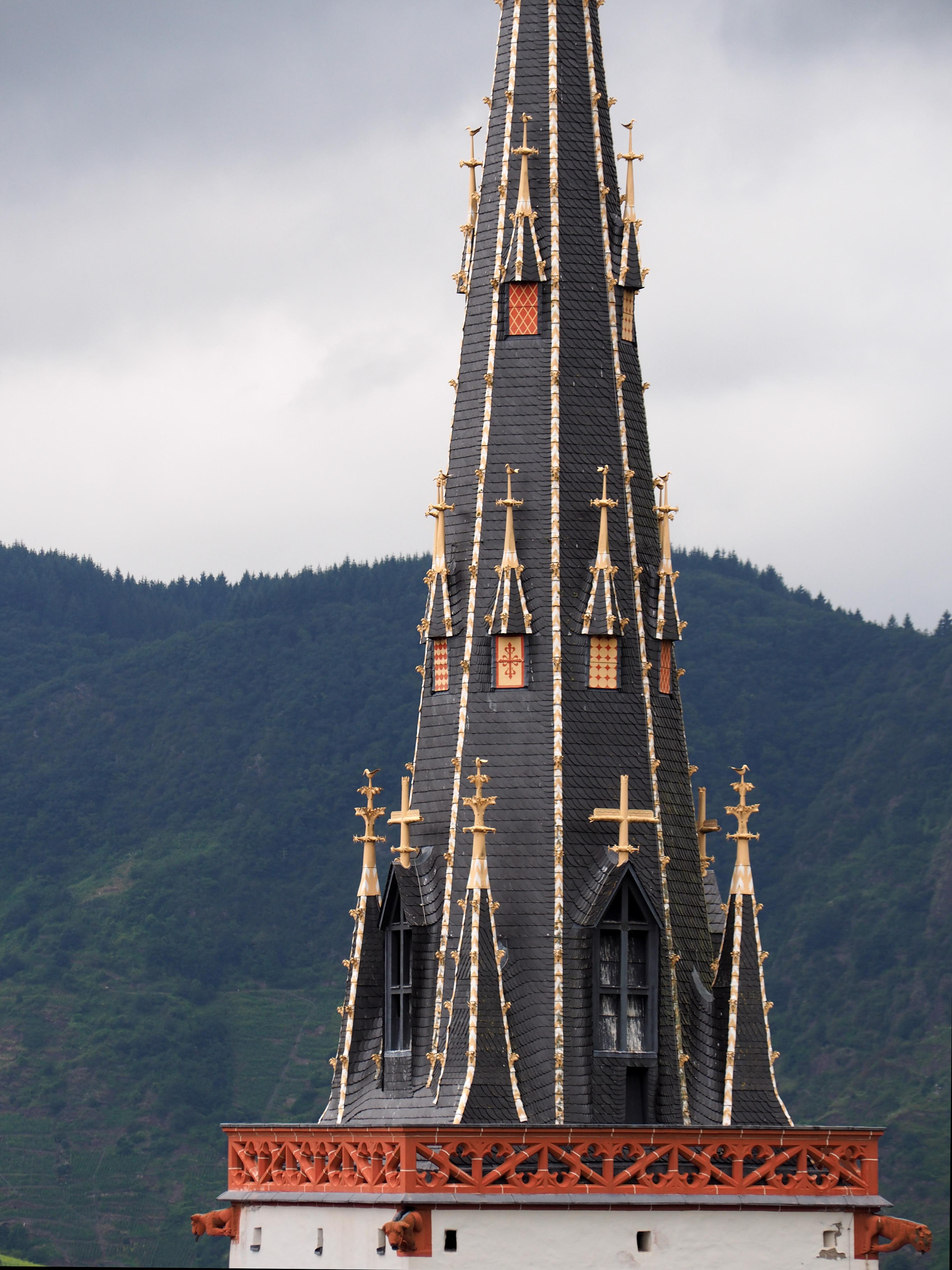 St. Martin in Ediger, einem Ortsteil von Ediger-Eller im Landkreis Cochem-Zell (Rheinland-Pfalz)